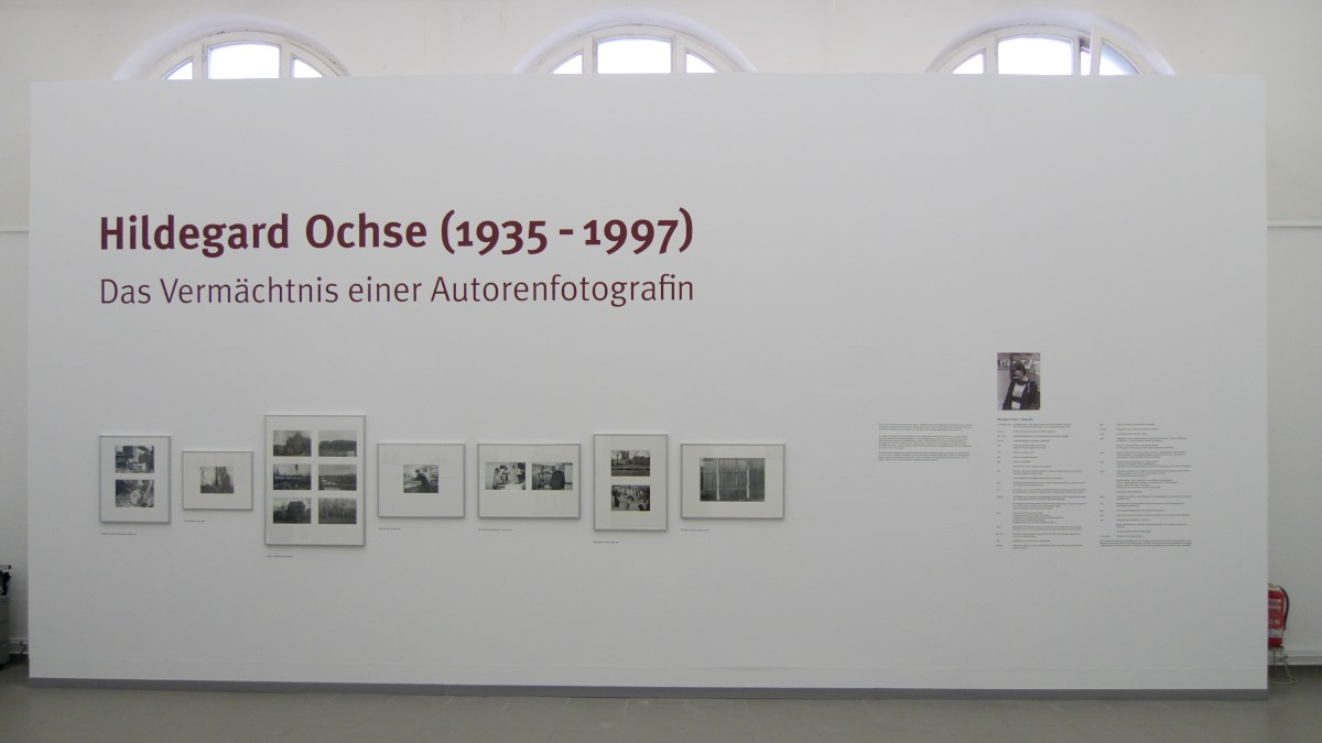 Ausstellungsraum Haus am Kleistpark